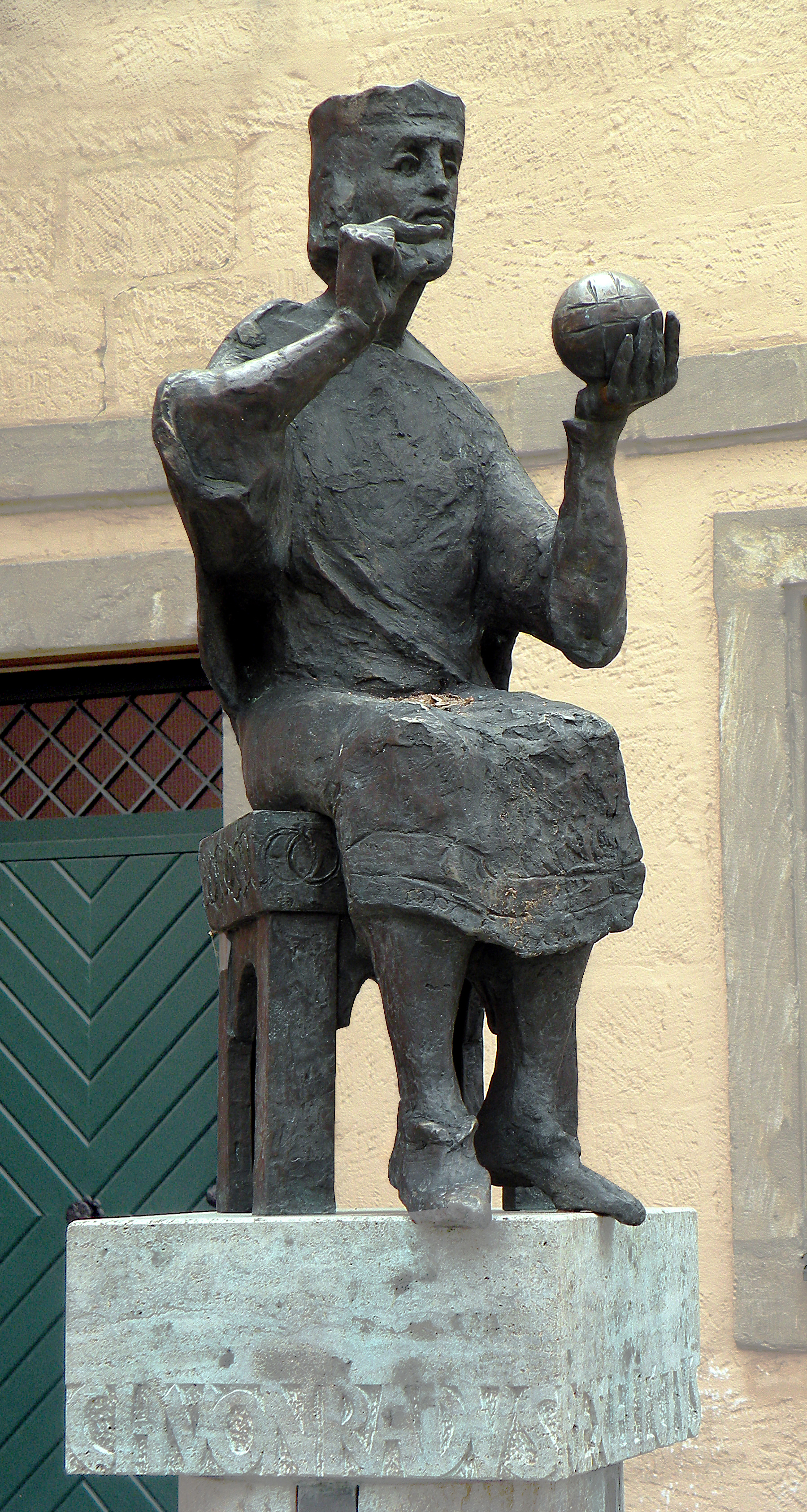 Forchheim, Konrad I.